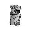 Escudo Santa Lucia Cotzumalguapa